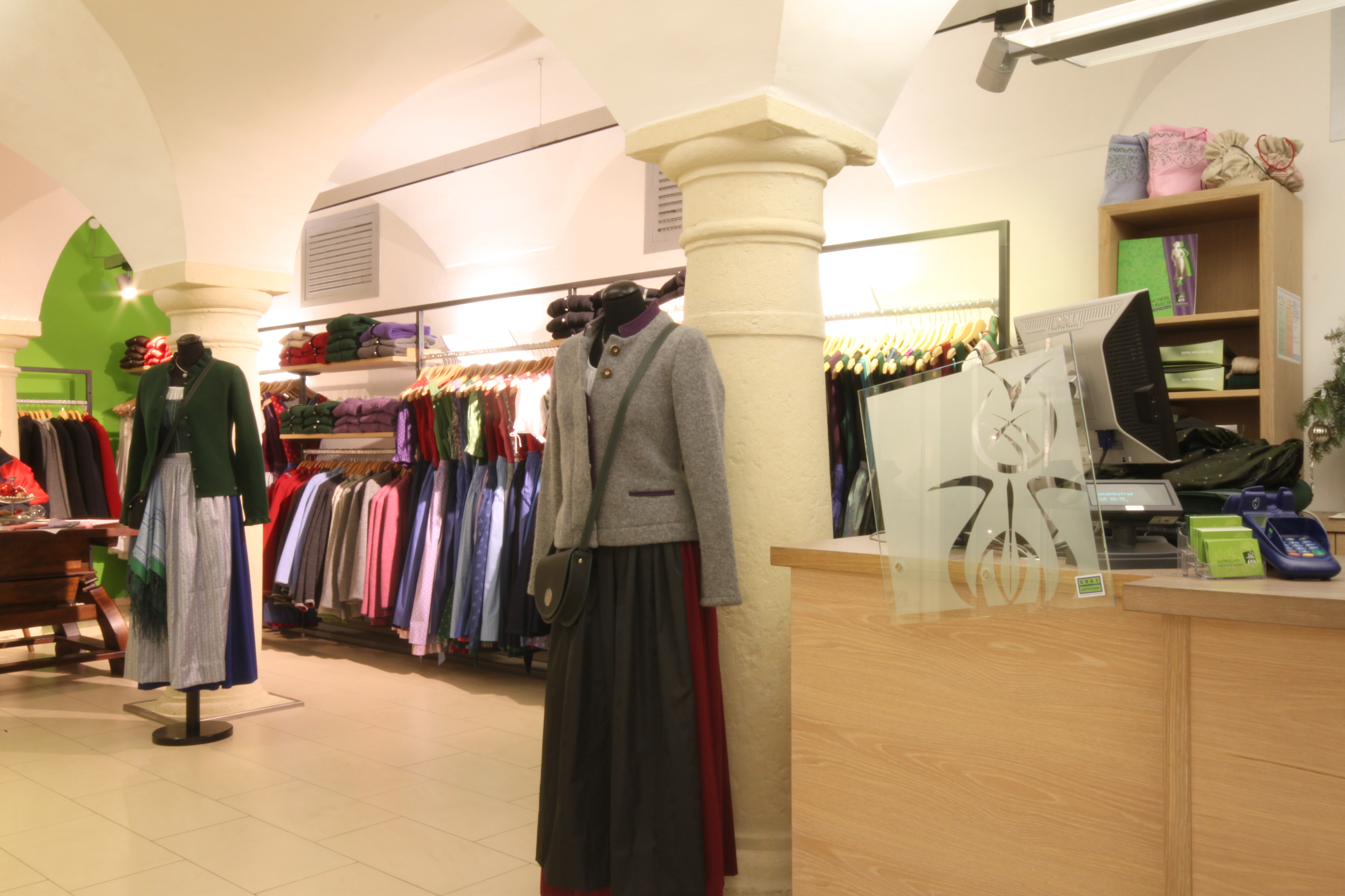 Die neuen Geschäftsräumlichkeiten des Steirischen Heimatwerkes seit Juli 2008